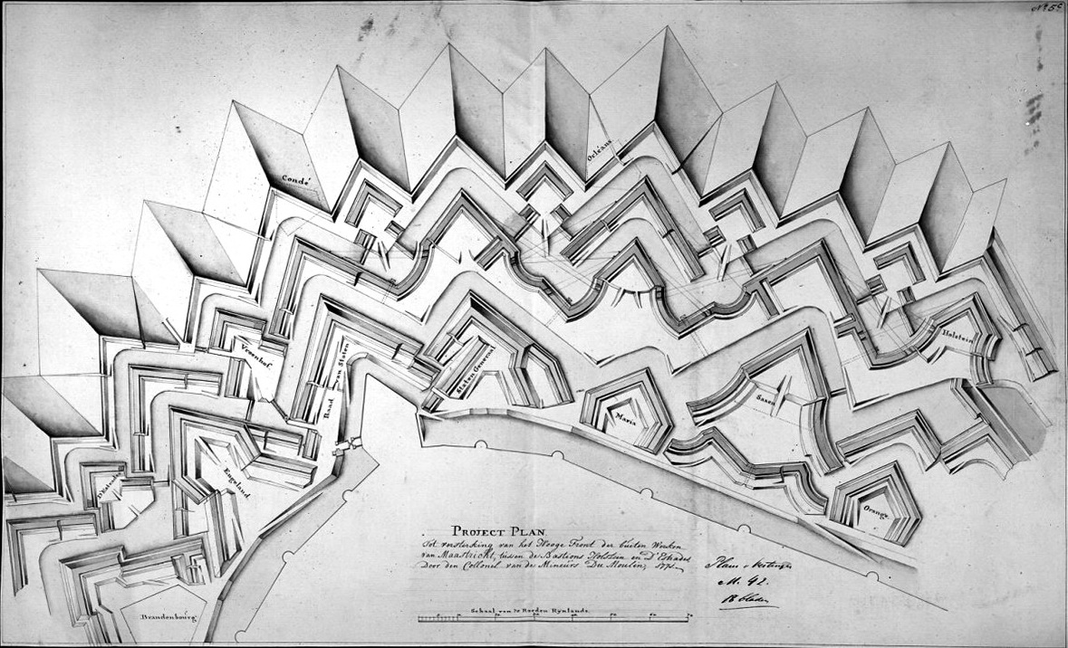 Vestingwerken van Maastricht: Plan van Carel Diederik du Moulin uit 1771 voor de Hoge Fronten (tekening in het Nederlands Weermacht Archief).